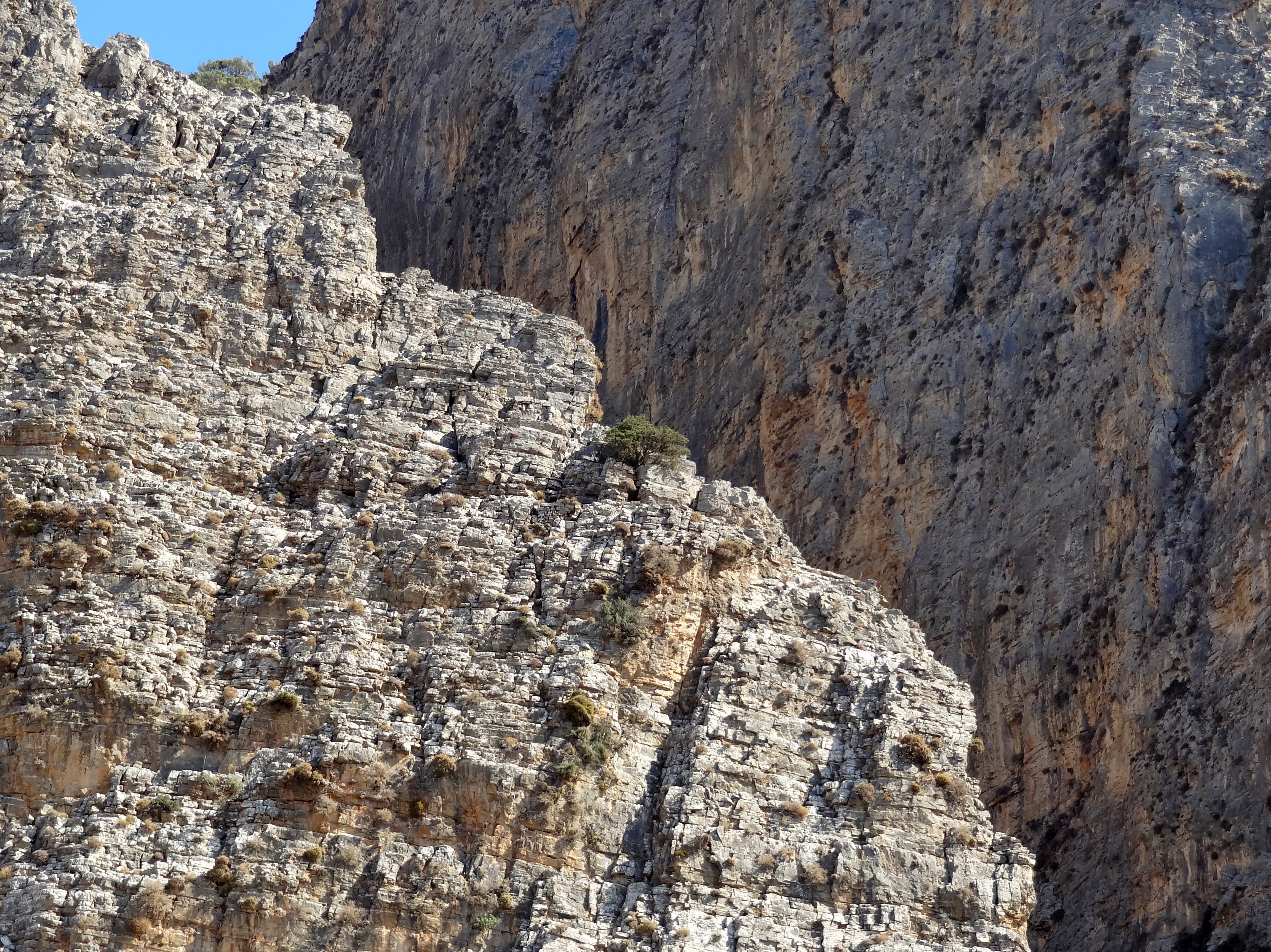 Eingang zur Cha-Schlucht bei Monastiraki, Kreta, Griechenland